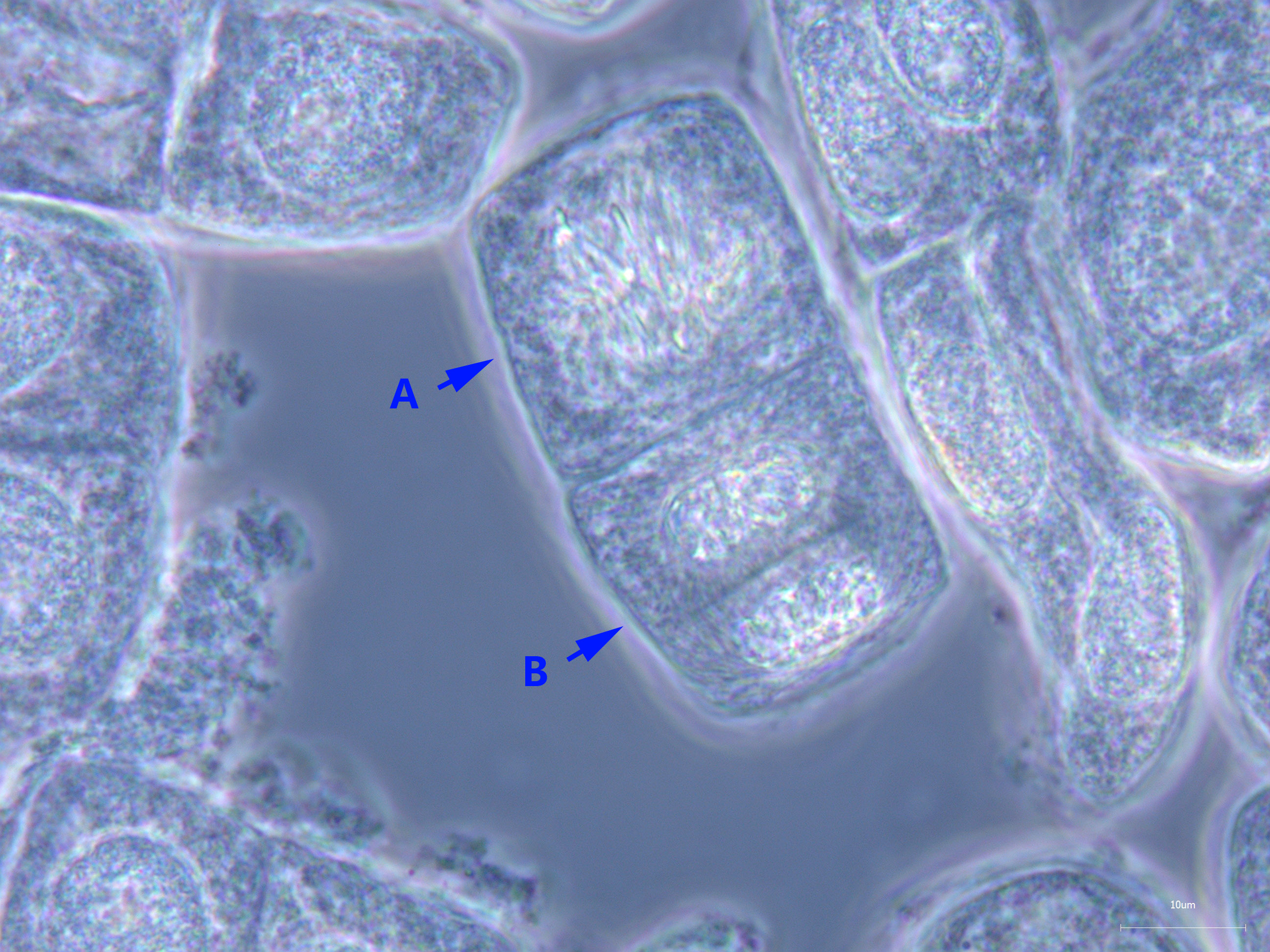 Onion root cells under phase-contrast microscope